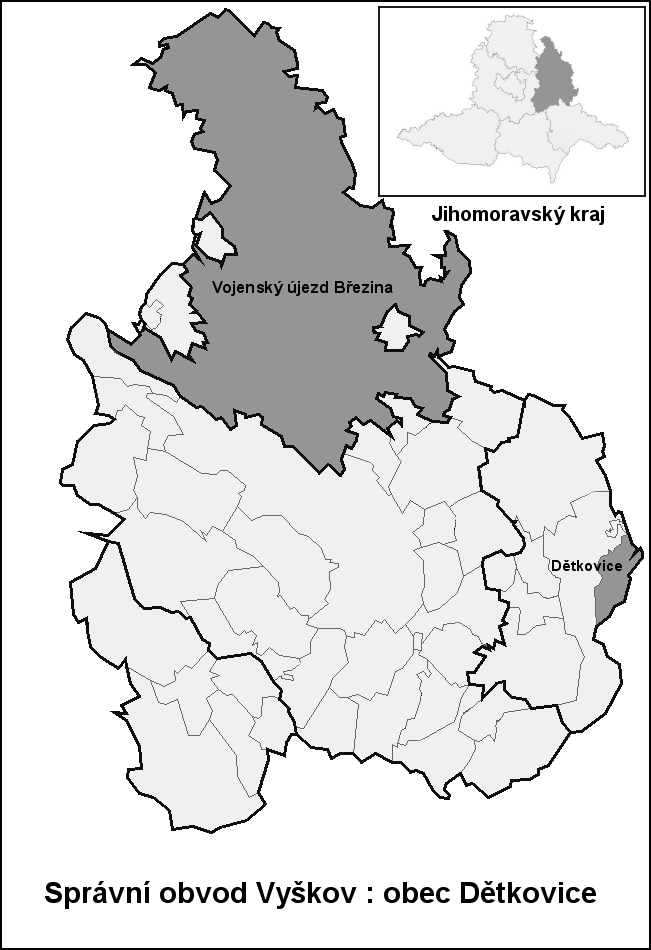 Správní obvod Vyškov : obec Dětkovice (Czech republic)